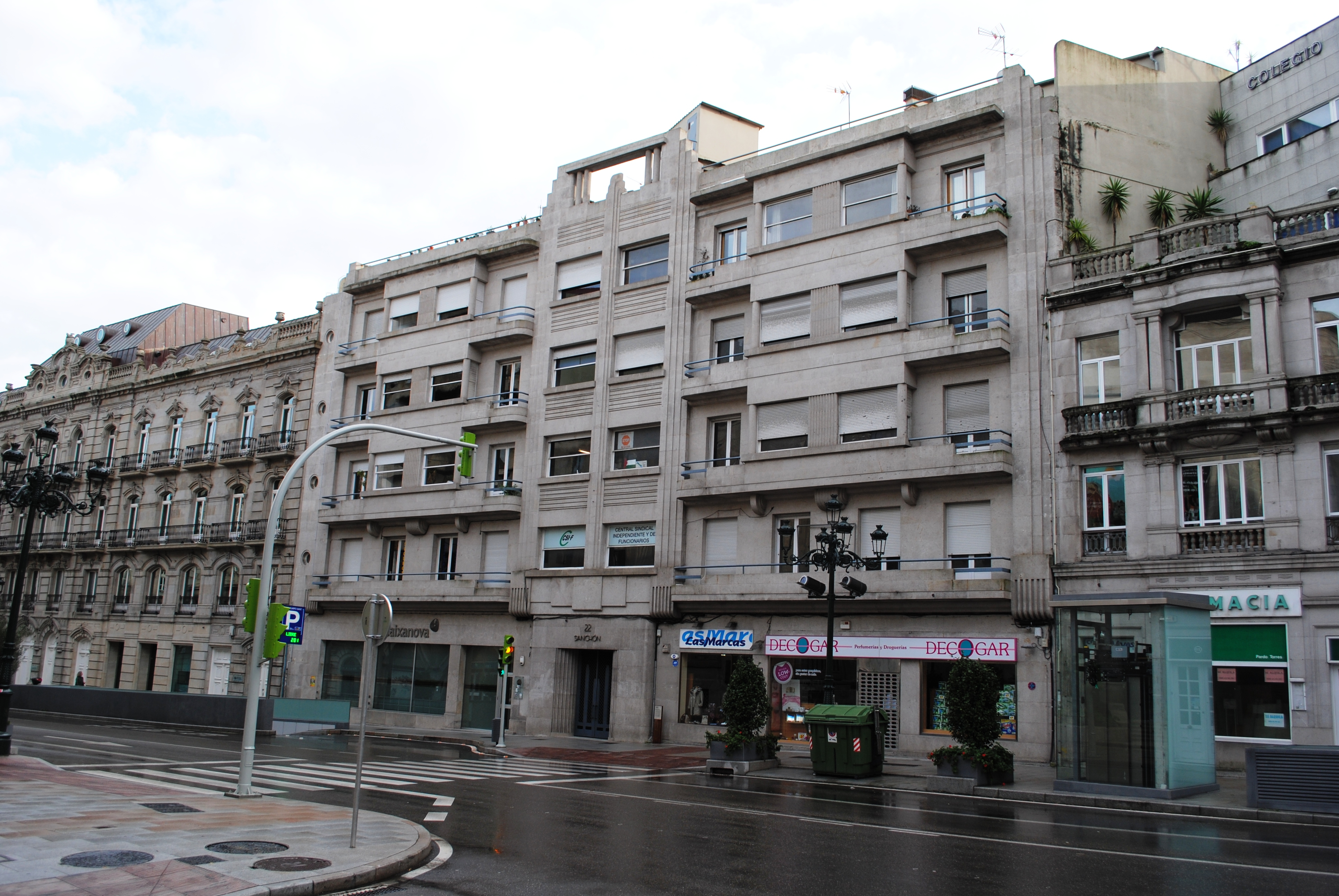 Edificio Sanchón, del arquitecto Francisco Castro Represas, en la calle Policarpo Sanz de Vigo.